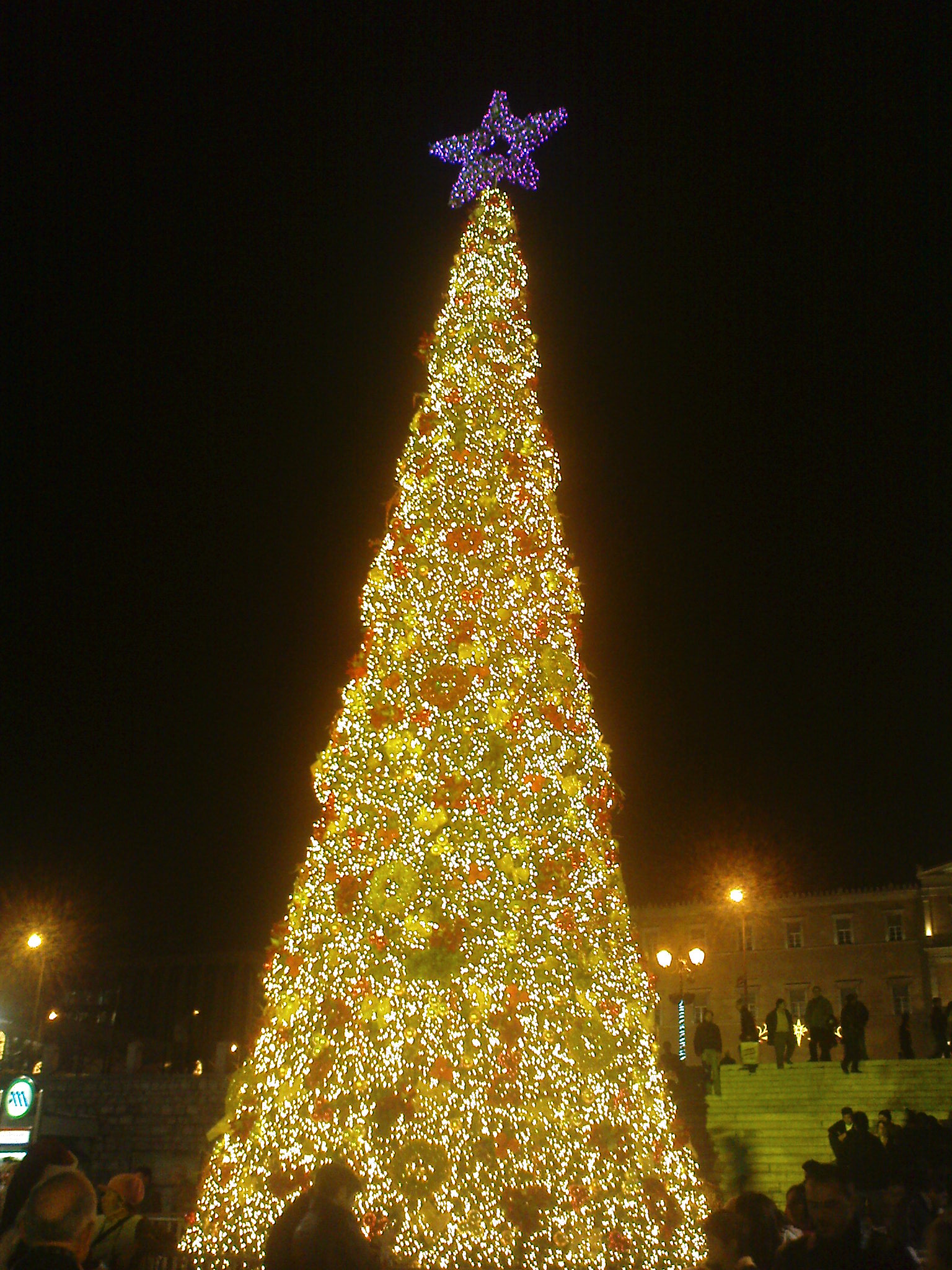 Arbre de Nadal en la plaça Syntagma, en Atenes, en el 2009. Christmas tree in Syntagma square, Athens 2009.